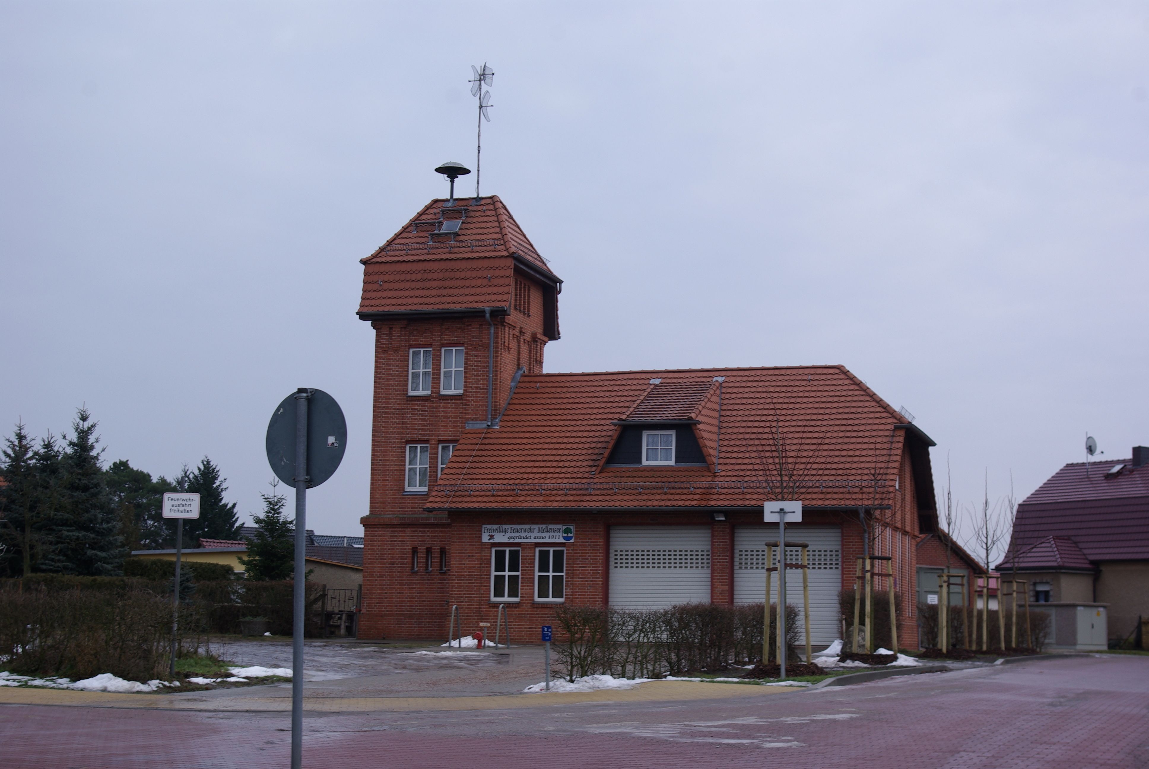 Am Mellensee, Brandenburg, Ortsteil Mellensee. Die Freiwillige Feuerwehr im Ortsteils Mellensee (geotags in exif-daten).